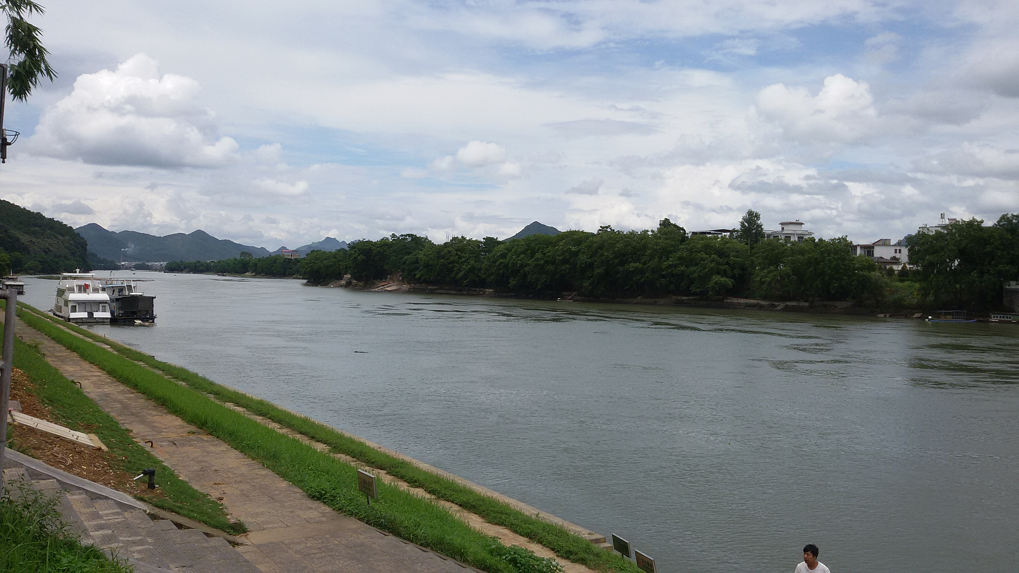 粵語: 磨盤山碼頭附近條灕江